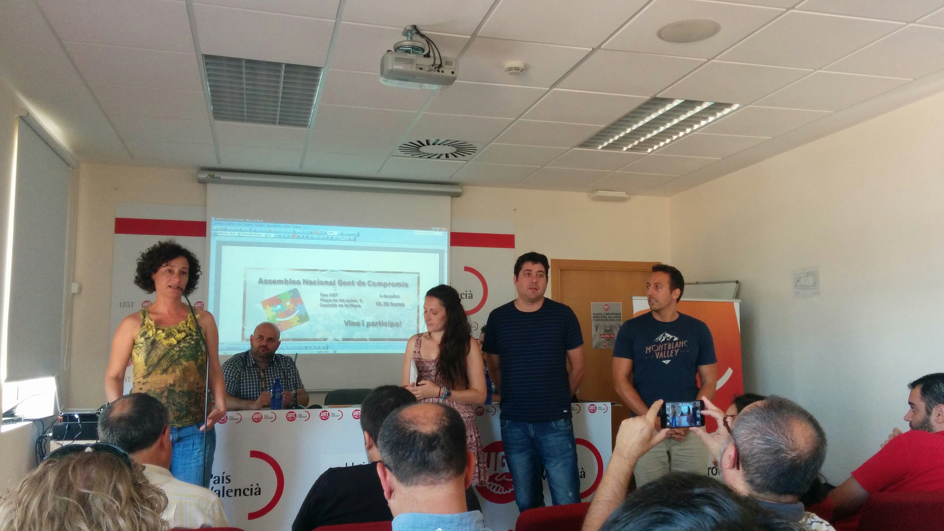 esquerra a dreta 1-Graciela Ferrer (diputada VLC) 2-Marian Campello (diputada ALC) 3-Josep Nadal (diputat ALC) 4-Secretari d'organització de GdC Cristian Ballesteros, en la VII Assemblea Nacional de Gent de Compromís a Castelló